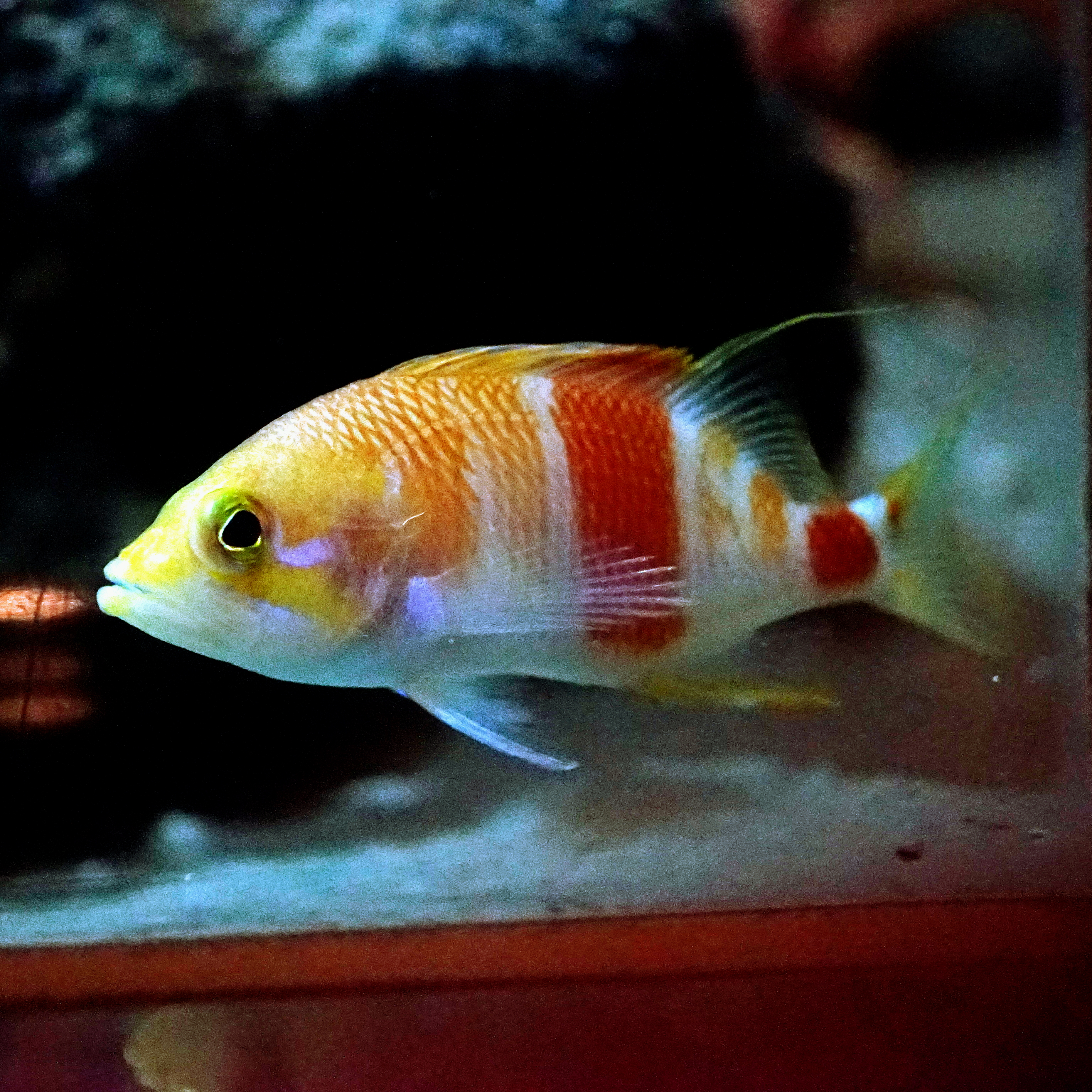 アズマハナダイ Eastern Flower Porgy Domain: Eukaryota • Regnum: Animalia • Phylum: Chordata • Subphylum: Vertebrata • Infraphylum: Gnathostomata • Superclassis: Osteichthyes • Classis: Actinopterygii • Ordo: Perciformes • Familia: Serranidae • Genus: Zalanthias Wikispecies has an entry on: Zalanthias kelloggi. Species Zalanthias kelloggi (Jordan & Evermann, 1903) 動物界 脊索動物門 条鰭綱 スズキ目 ハタ科 Zalanthias属 Location: Tokyo Sea Life Park (Kasai Rinkai Suizokuen), Japan Other photos: NCBI Taxonomy ID:274792 EOL link: Zalanthias kelloggi uBio search link: Zalanthias kelloggi Copyright: User:OpenCage